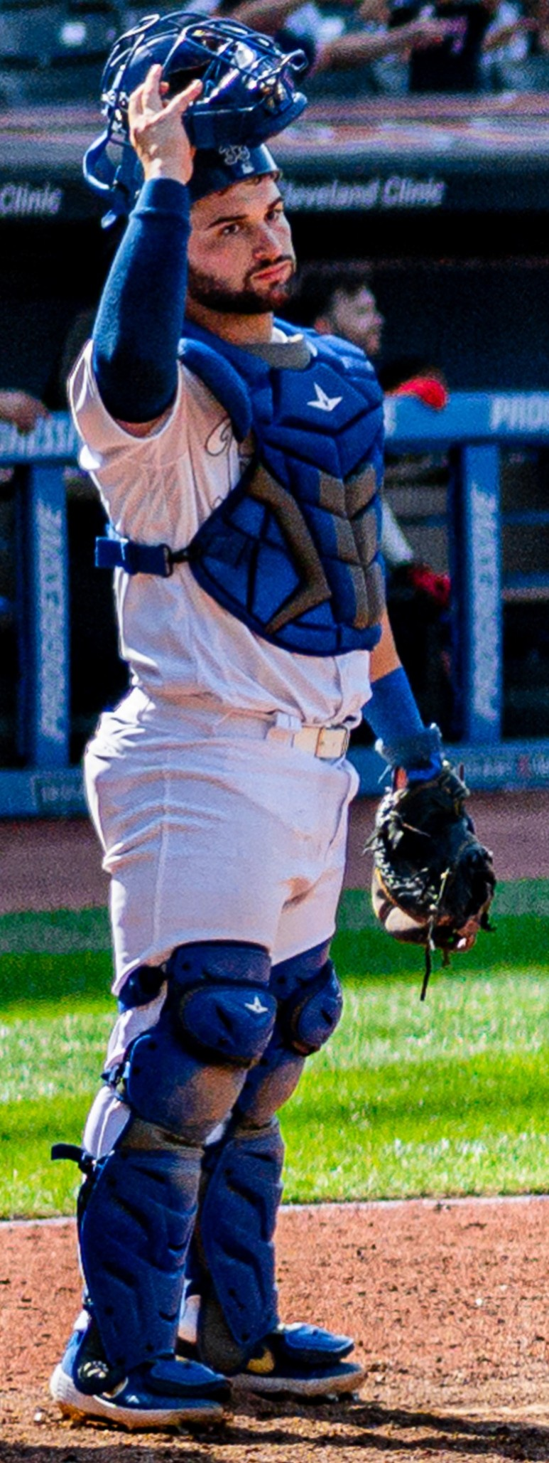 Kansas City Royals VS. Cleveland Indians